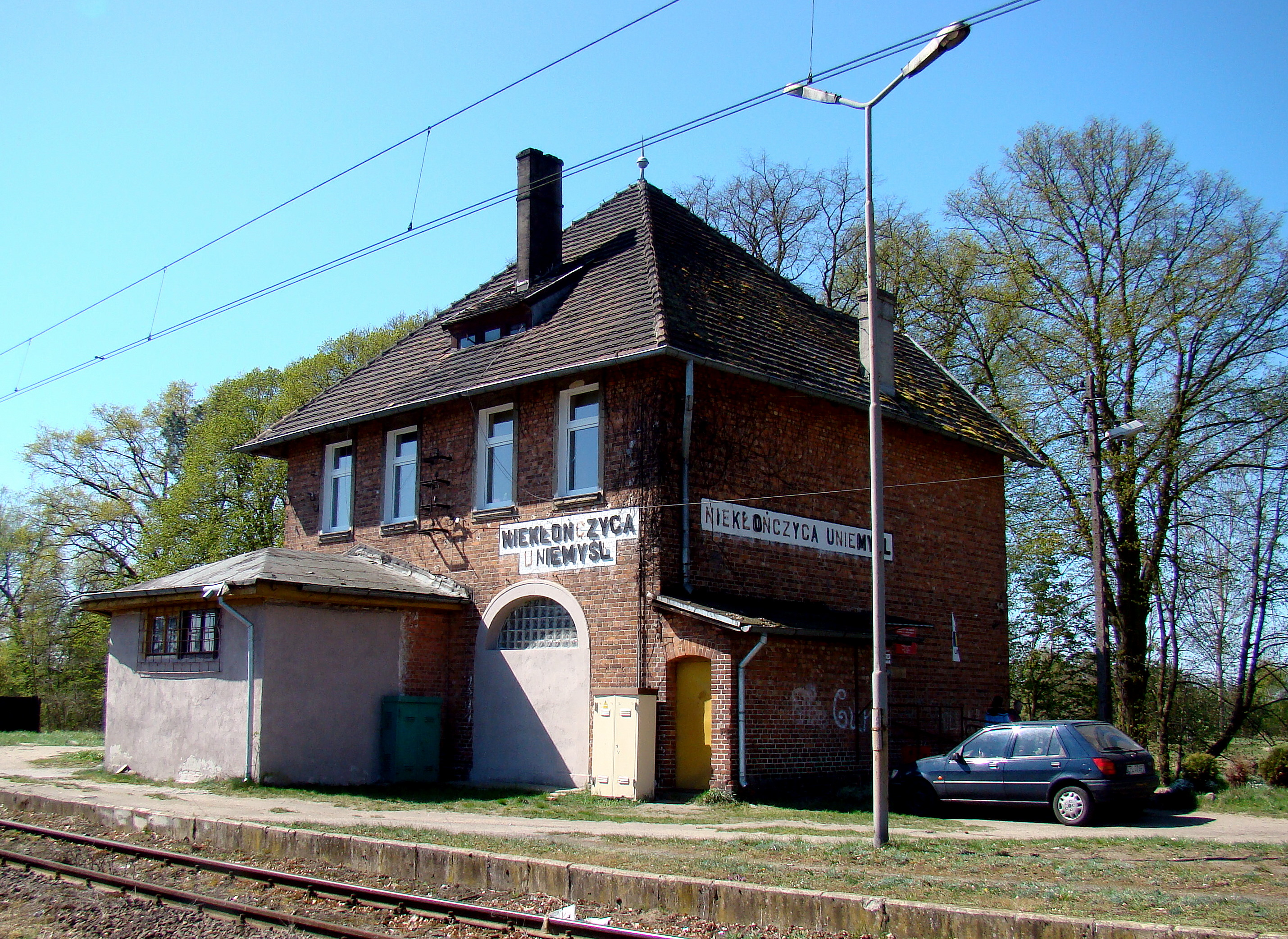 Dębostrów, przystanek kolejowy (nieczynny), (Gmina Police, Województwo zachodniopomorskie), Polska